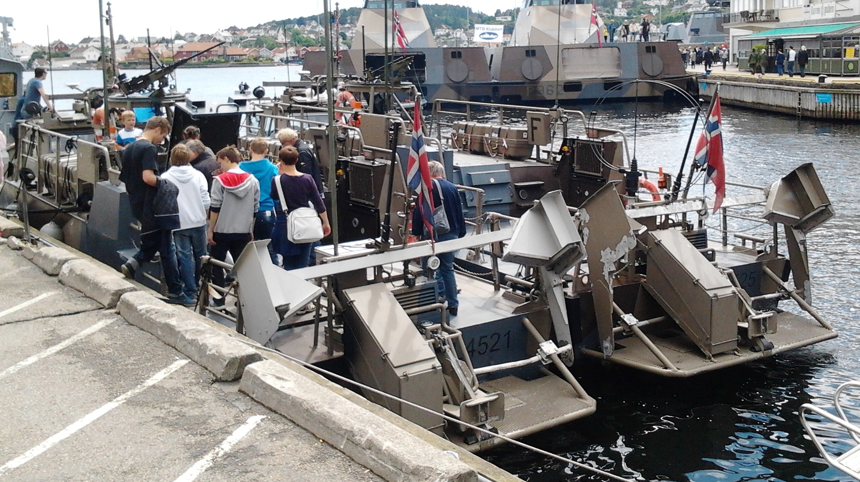 2 stk Stridsbåt 90N i Arendal, Norge